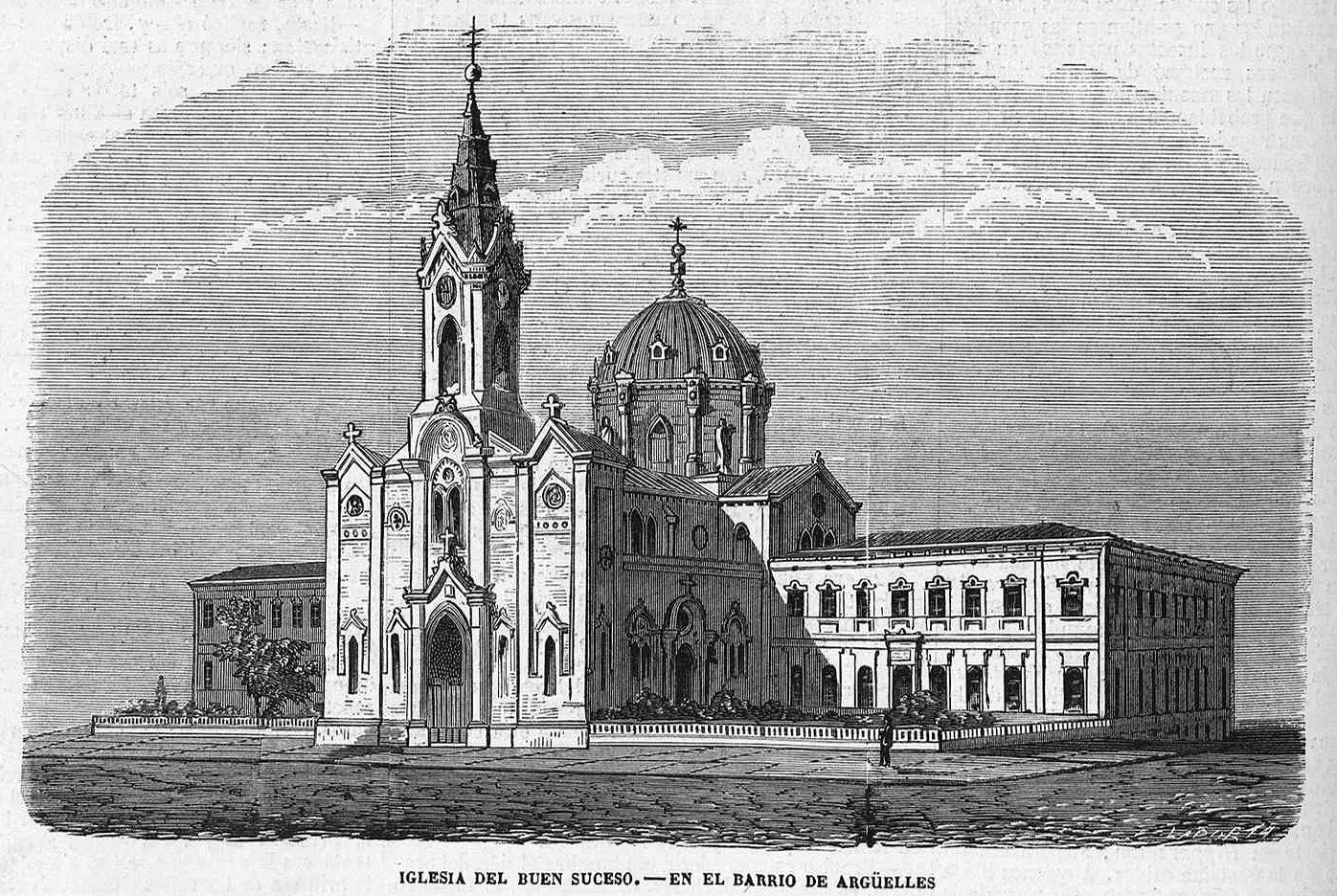 Iglesia del Buen Suceso en el barrio de Argüelles, en la revista española El Museo Universal.